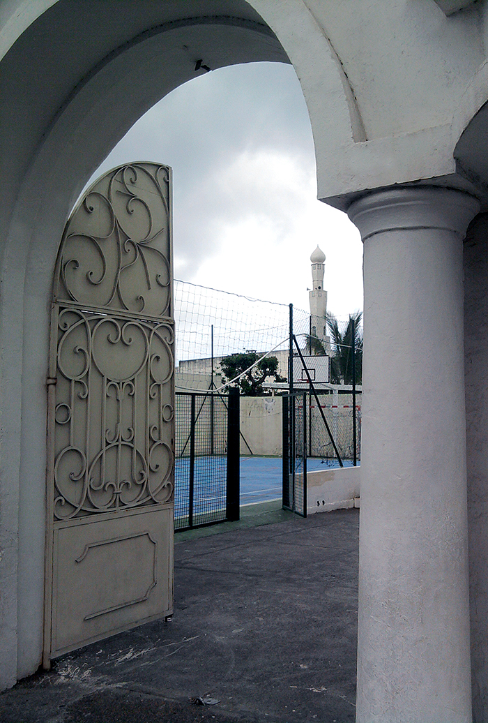 Portail à l'entrée de l'Ecole Medersa Taalimoul Islam En second plan, le terrain de sport de l'école. En troisième plan, le minaret de la Mosquée Noor-e-Islam